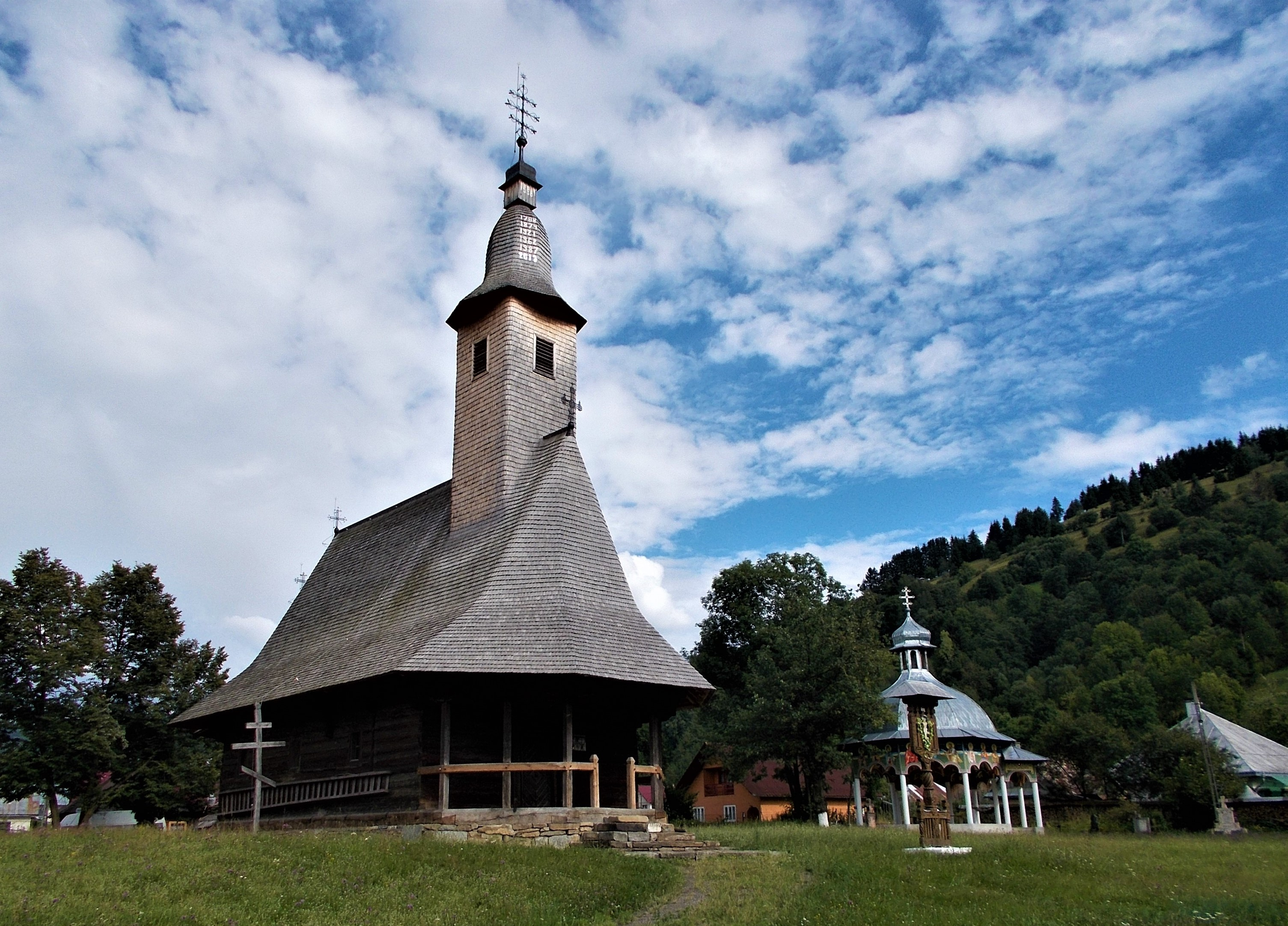 Biserica de lemn ucraineană din Poienile de sub Munte, județul Maramureș